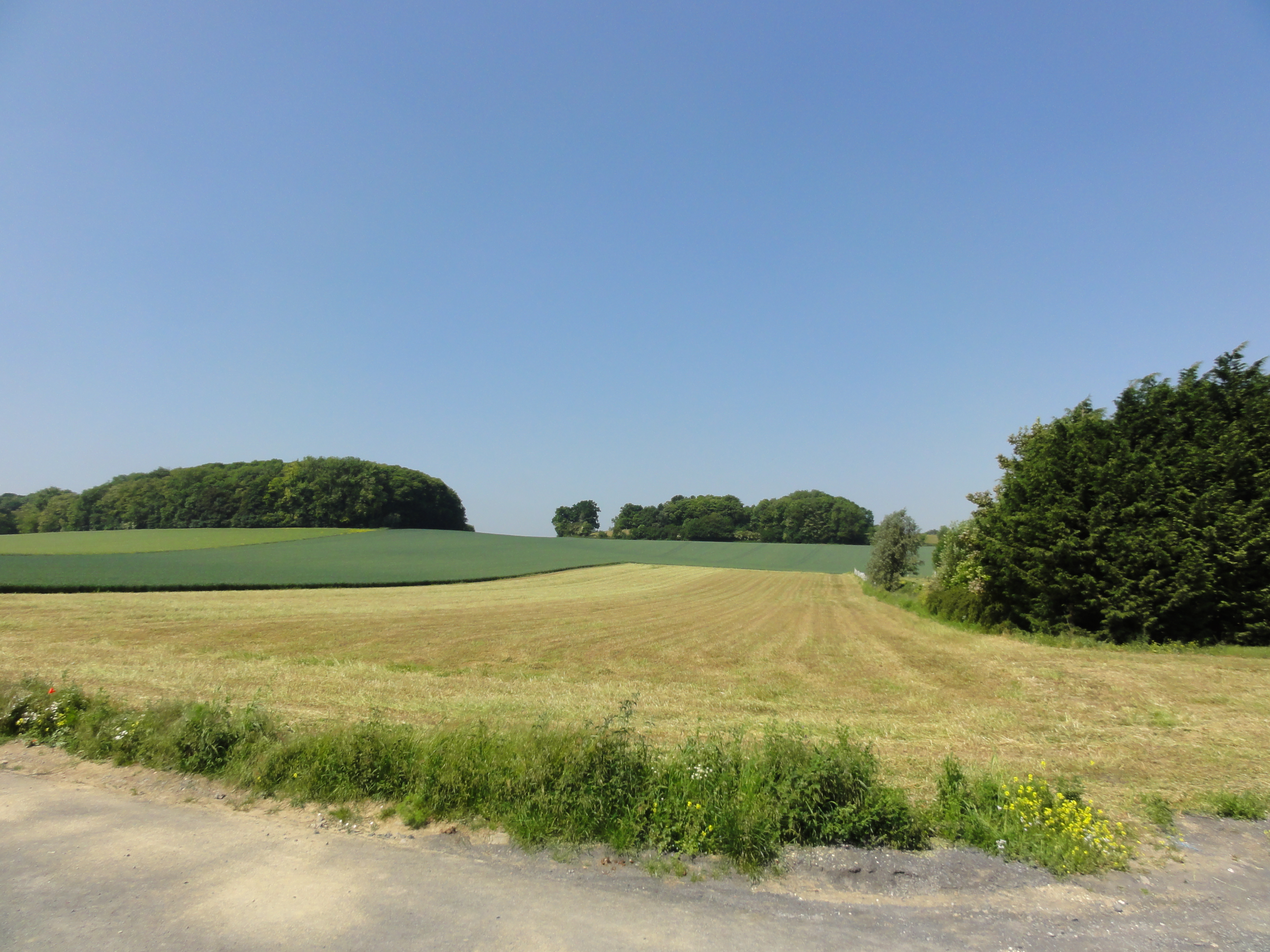 L'Avaleresse d'Erchin ou Erchin de la Société d'Erchin était un puits sans exploitation situé à Erchin, Nord, Nord-Pas-de-Calais, France.